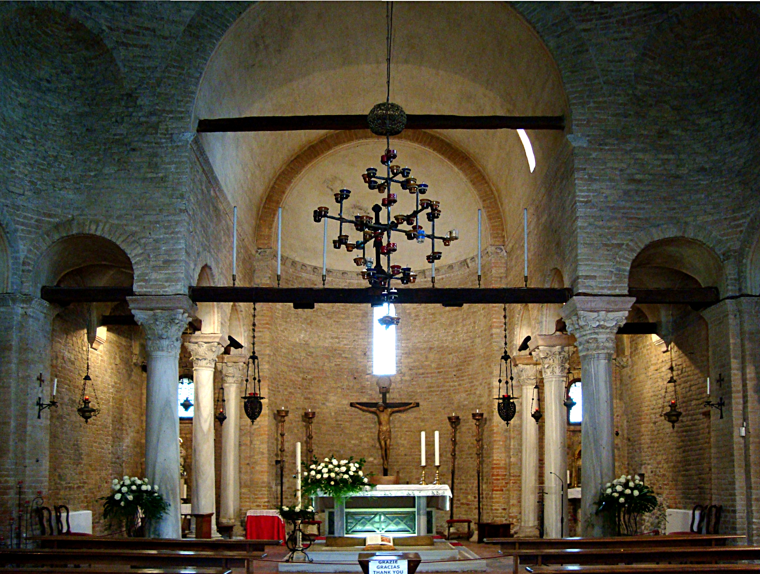 La nef de l'église Santa Fosca à Torcello (Italie).